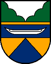 Gemeinde Tiefgraben: Geteilt durch einen blauen, oben golden gesäumten Balken, darin ein silberner Mondseer Einbaum; oben in Grün eine silberne, eingebogene, gestürzte Spitze, unten in Gold eine blaue, steigende Spitze.